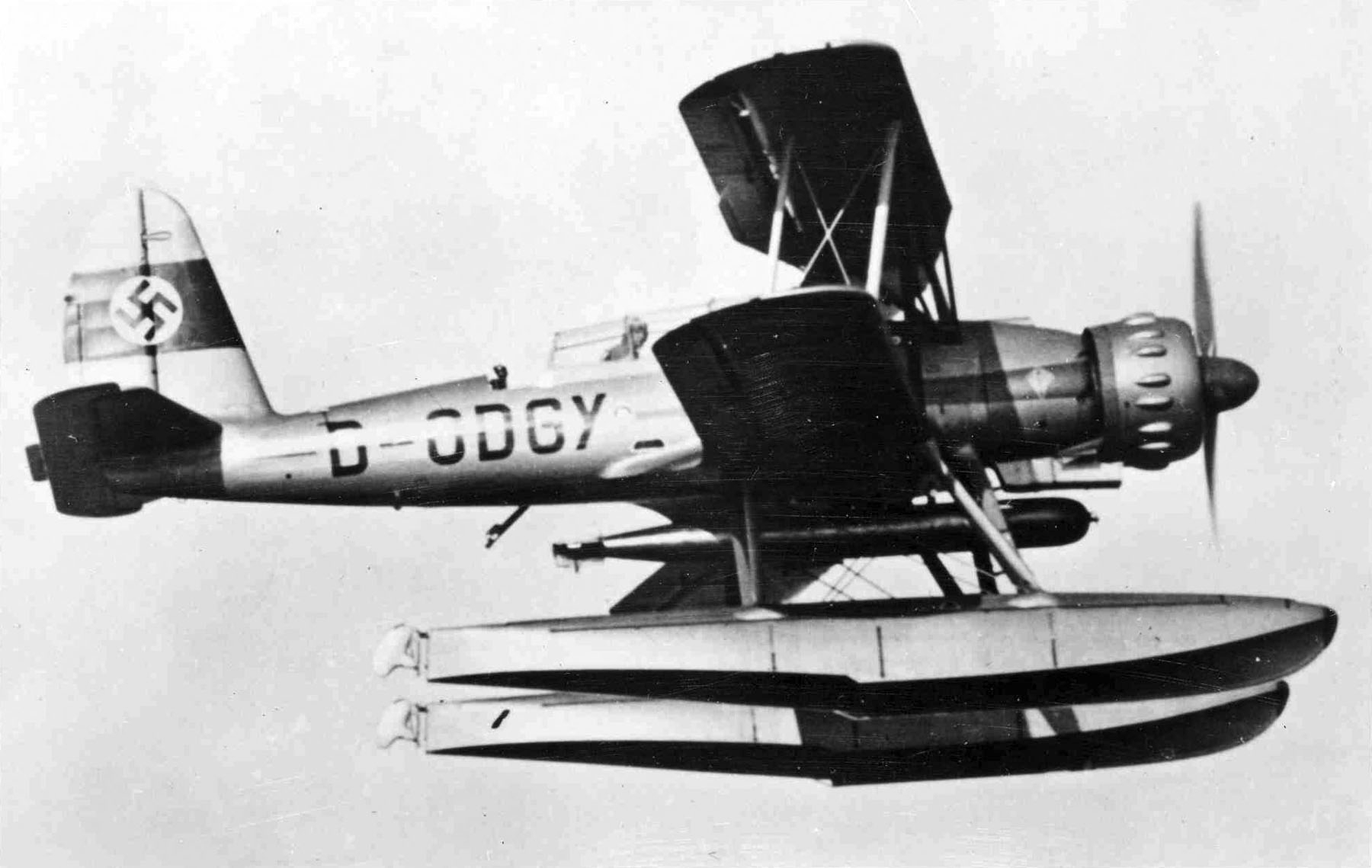 Arado Ar 95, Luftfahrzeugkennzeichen D-ODGY.